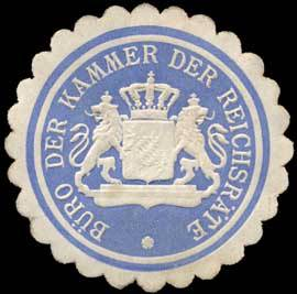 Sealing stamp Title: Büro der Kammer der Reichsräte-München Description: blau, weiß, geprägt Place: München size: 4 cm